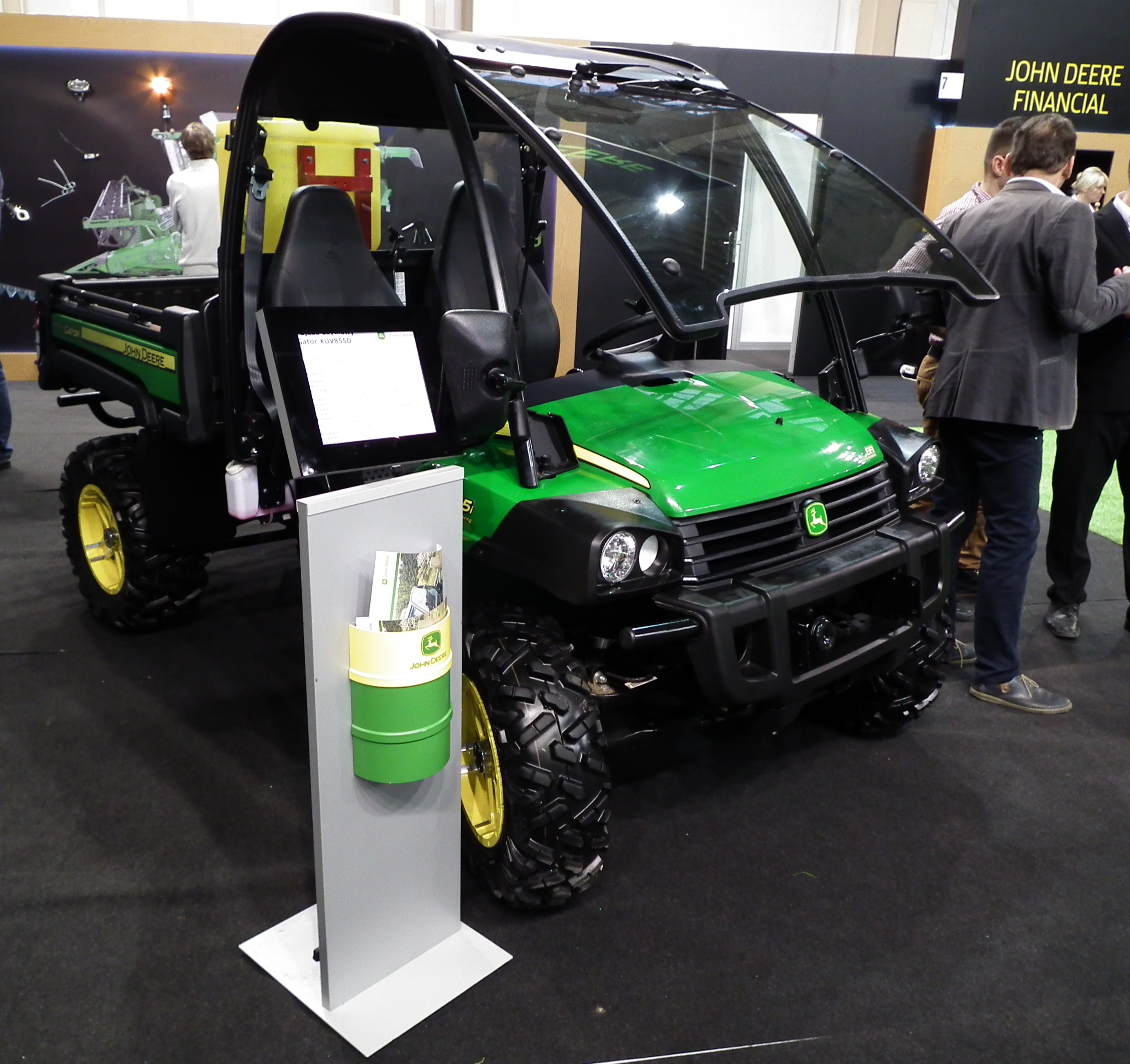 Pojazd użytkowy John Deere Gator. Polagra Poznań 2016r.